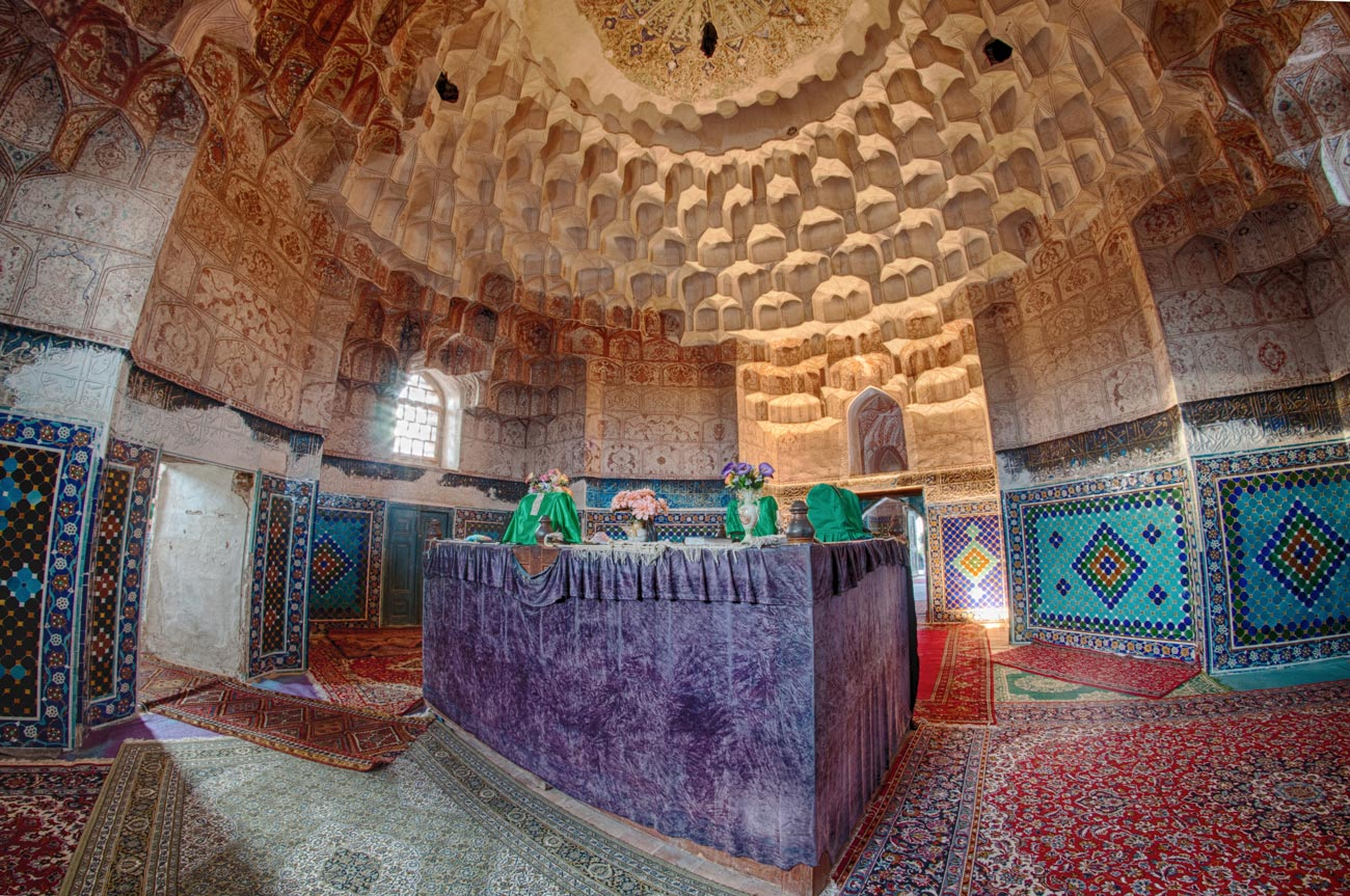 بقعه شیخ امین الدین جبراییل ، آرامگاه پدر شیخ صفی‌الدین اسحق اردبیلی جد سلاطین صفوی ، شیخ کلخوران اردبیل